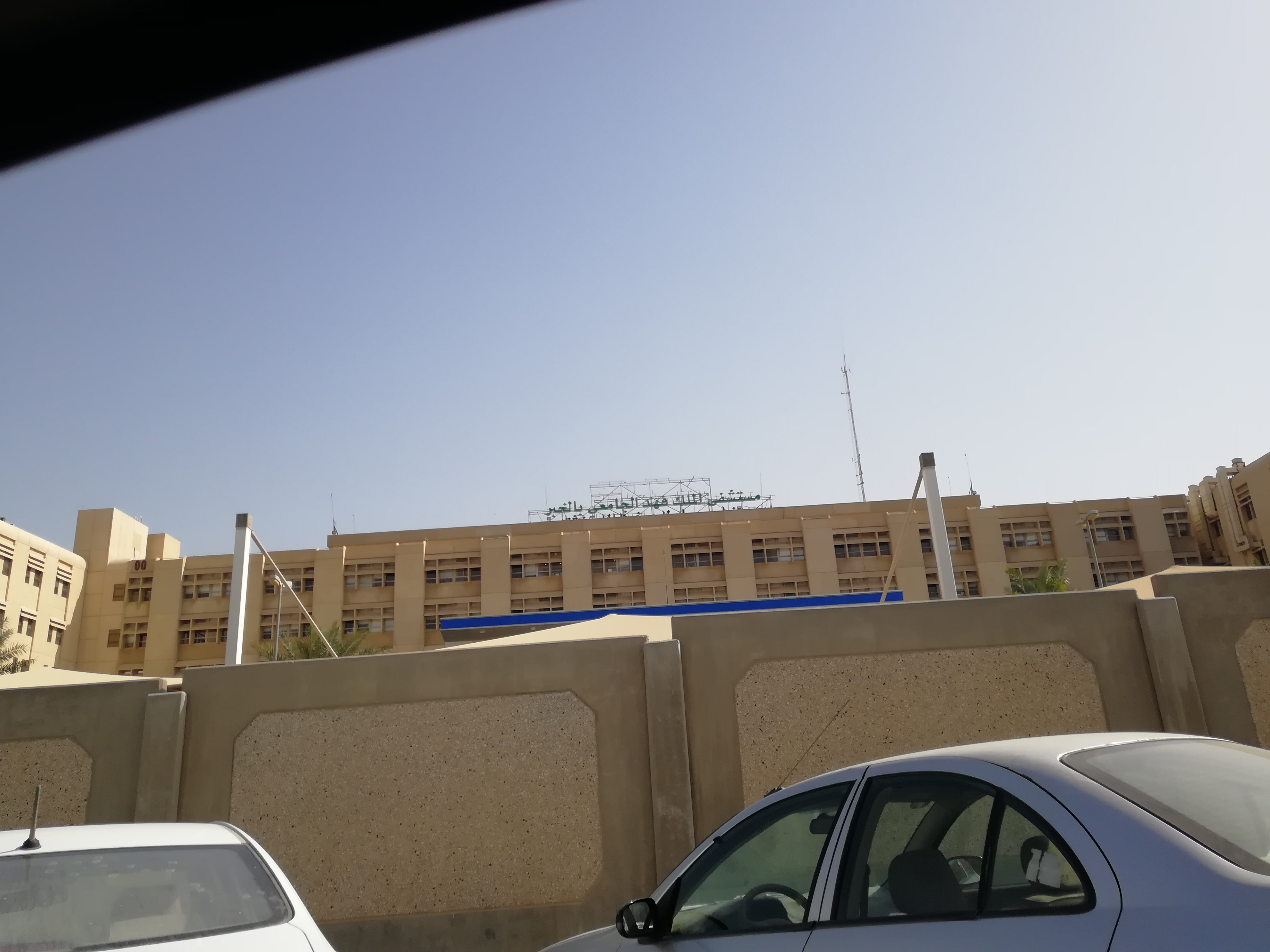 KFHU